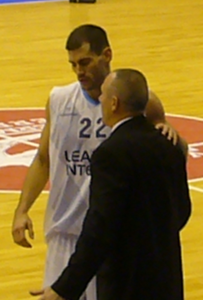 Le joueur Américain Marc Salyers, sous le maillot de la Chorale de Roanne (FRA) en Euroleague 2007-2008.